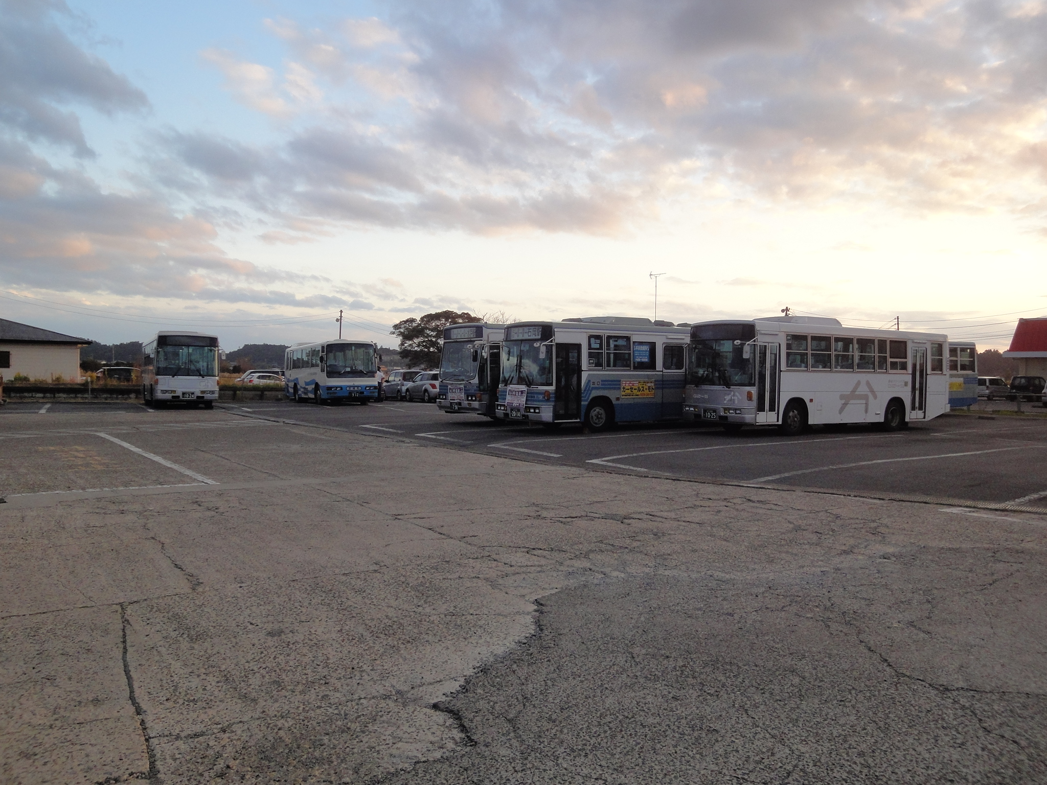 鉾田駅バスターミナル